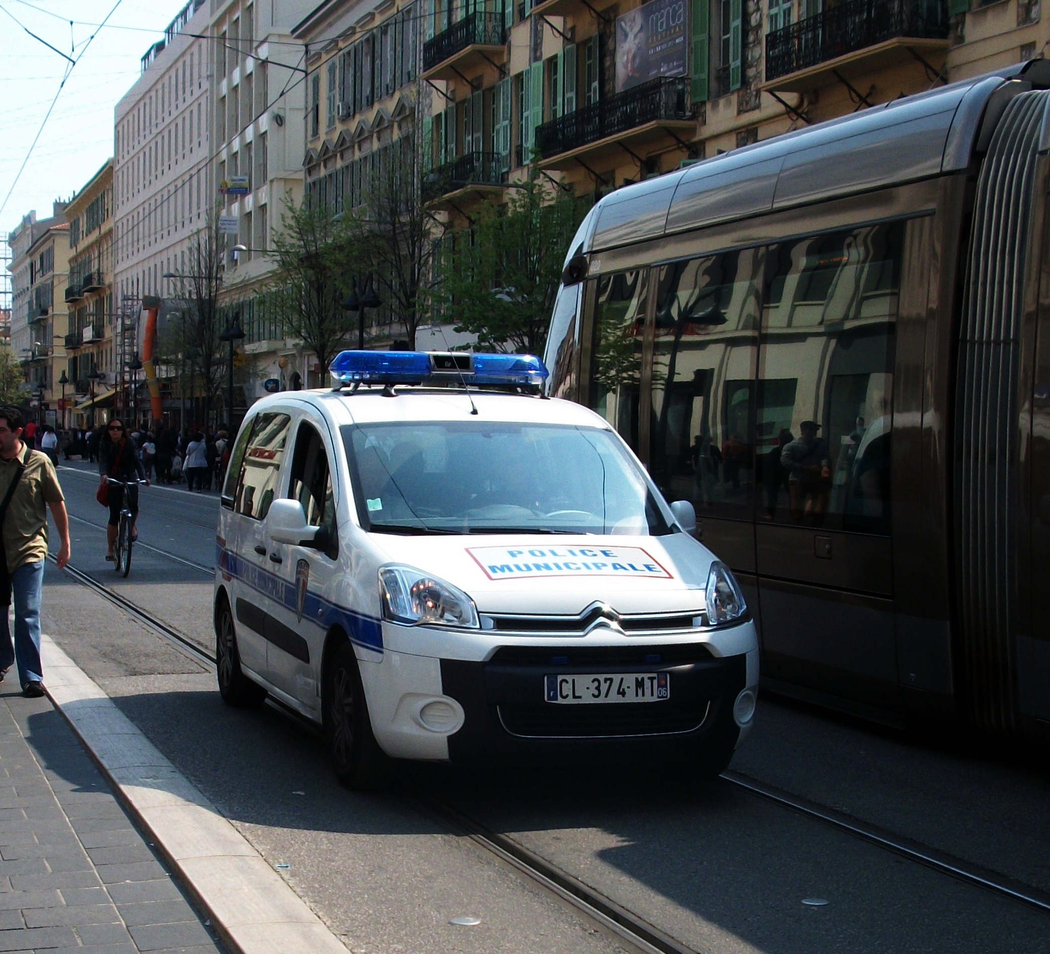 Citroen Berlingo de la police municipale de Nice